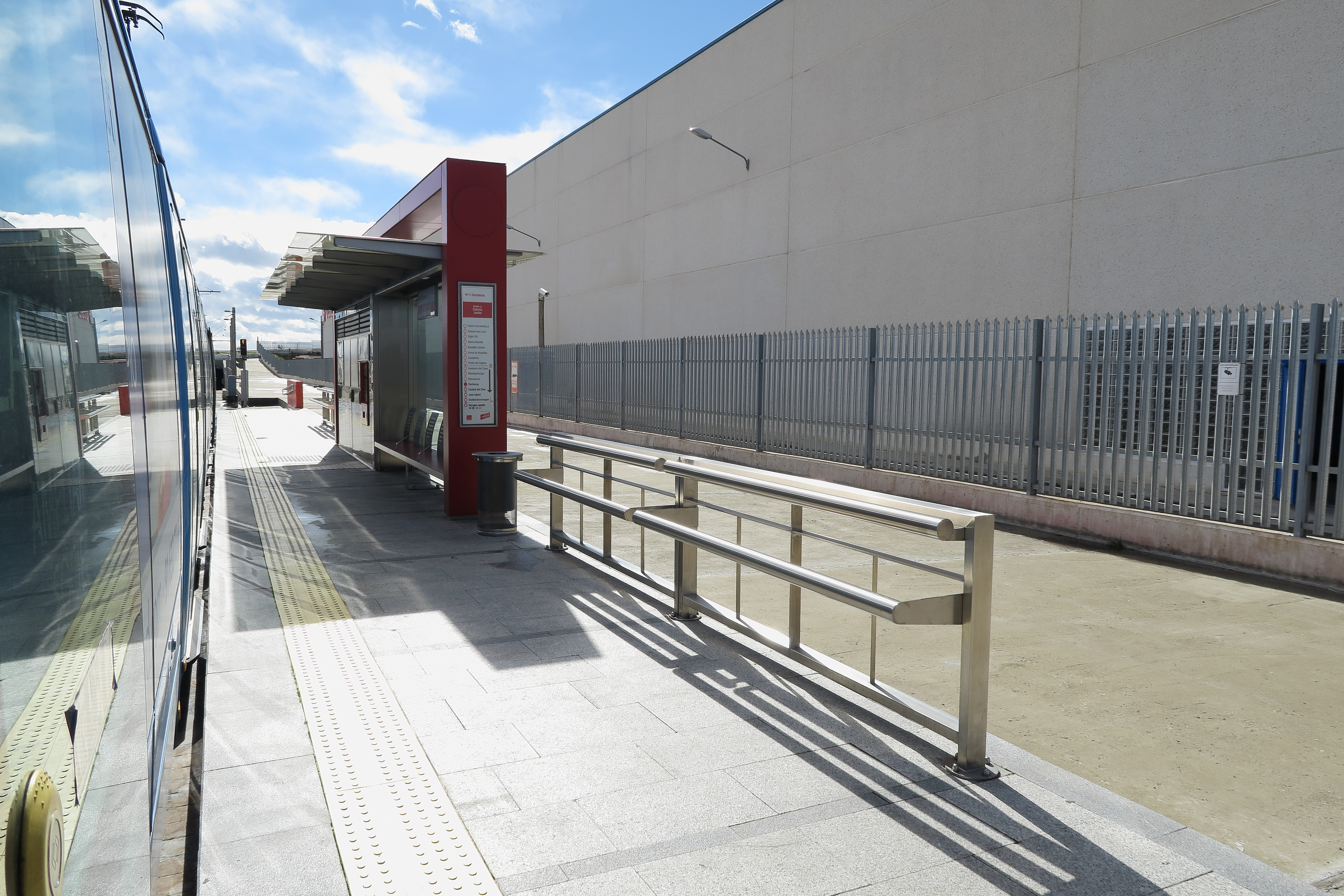 Estación de Cocheras (Metro Ligero de Madrid)